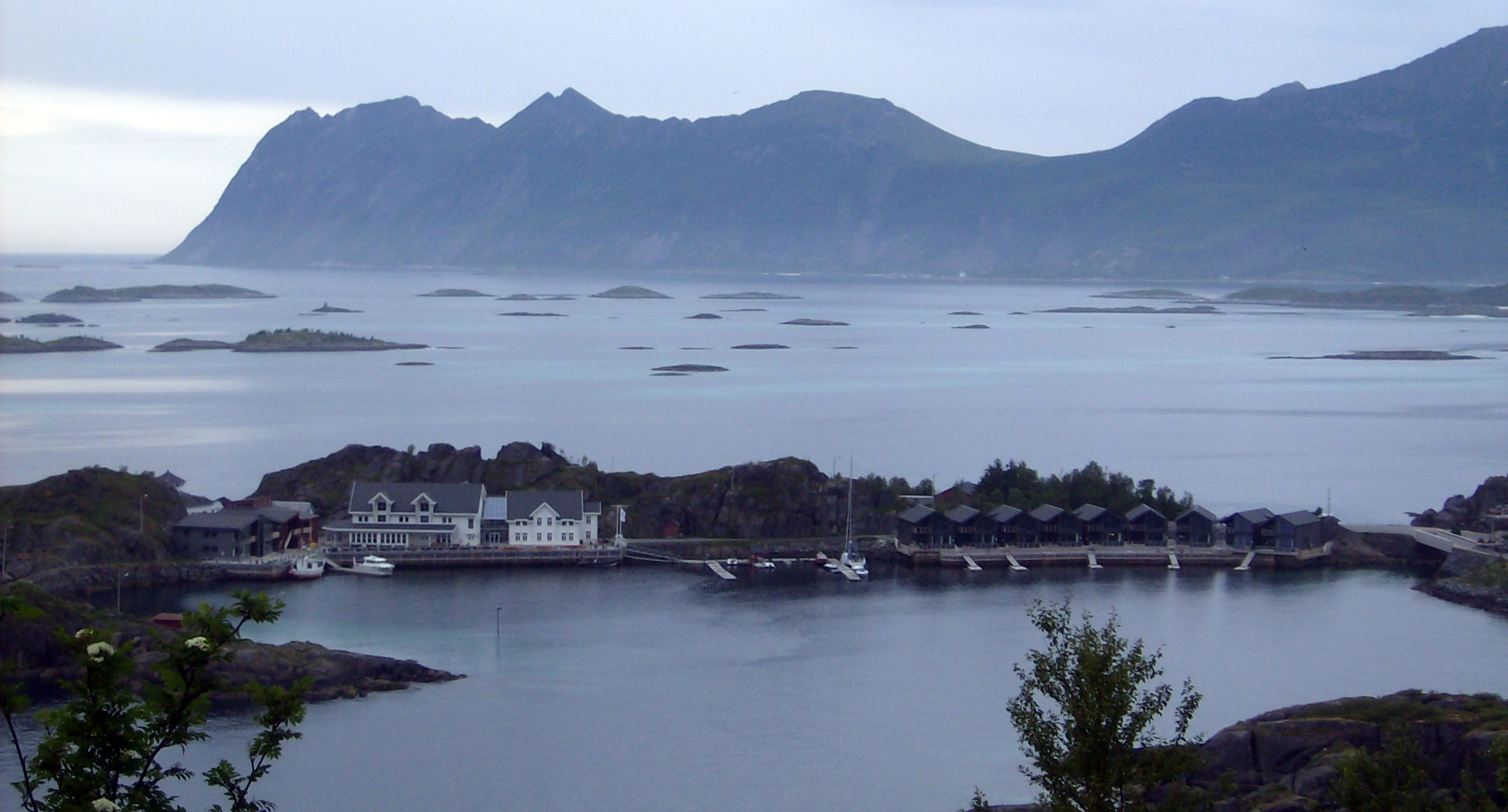 View of Hamn i Senja, Norge